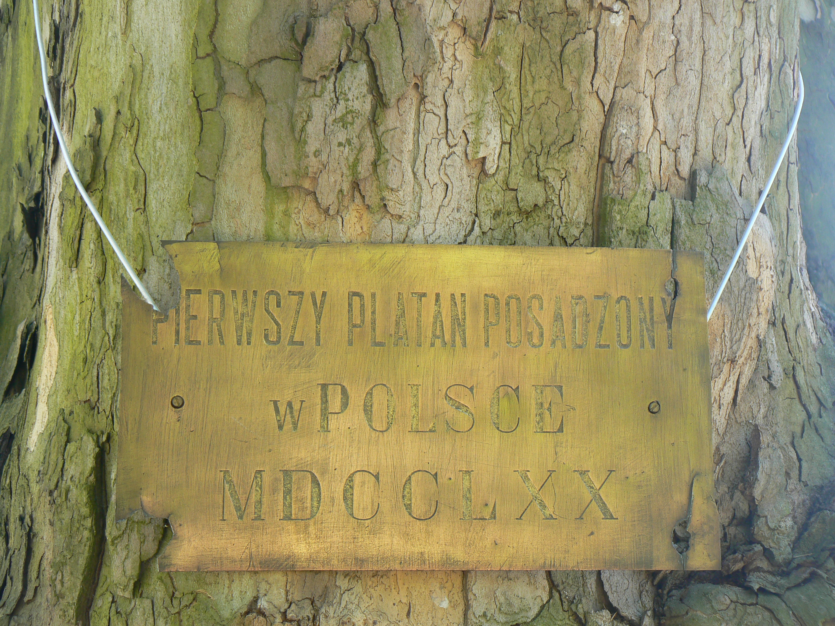 Tabliczka informacyjna, znajdująca się na platanie rosnącym w parku przy pałacu Radziwiłłów w Nieborowie.